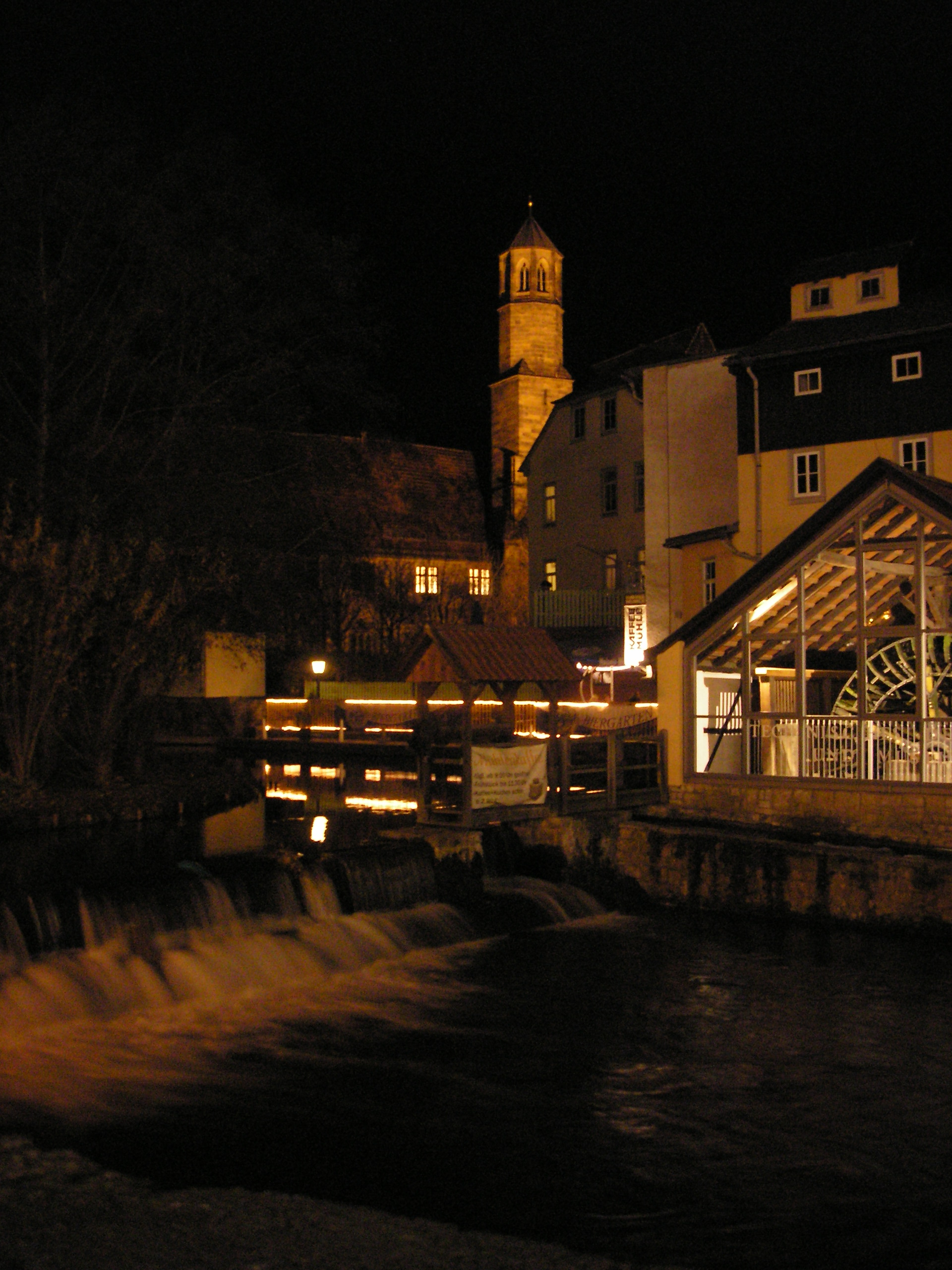 Die Gera an der Schlösserbrücke in Erfurt bei Nacht. Rechts die Neue Mühle, hinten der Turm der Predigerkirche.